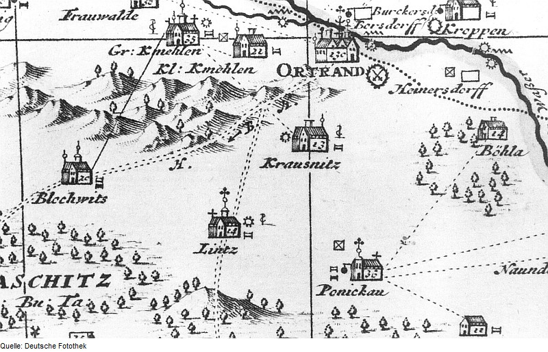 Original image description from the Deutsche Fotothek Schönfeld-Kraußnitz. Karte des Amtes Großenhain, von Zürner, 1711, Nachträge 1730 (Sign.: VII 108)